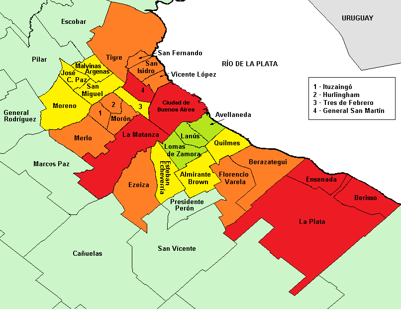 AMBA - Gran La Plata Inundación de 2013